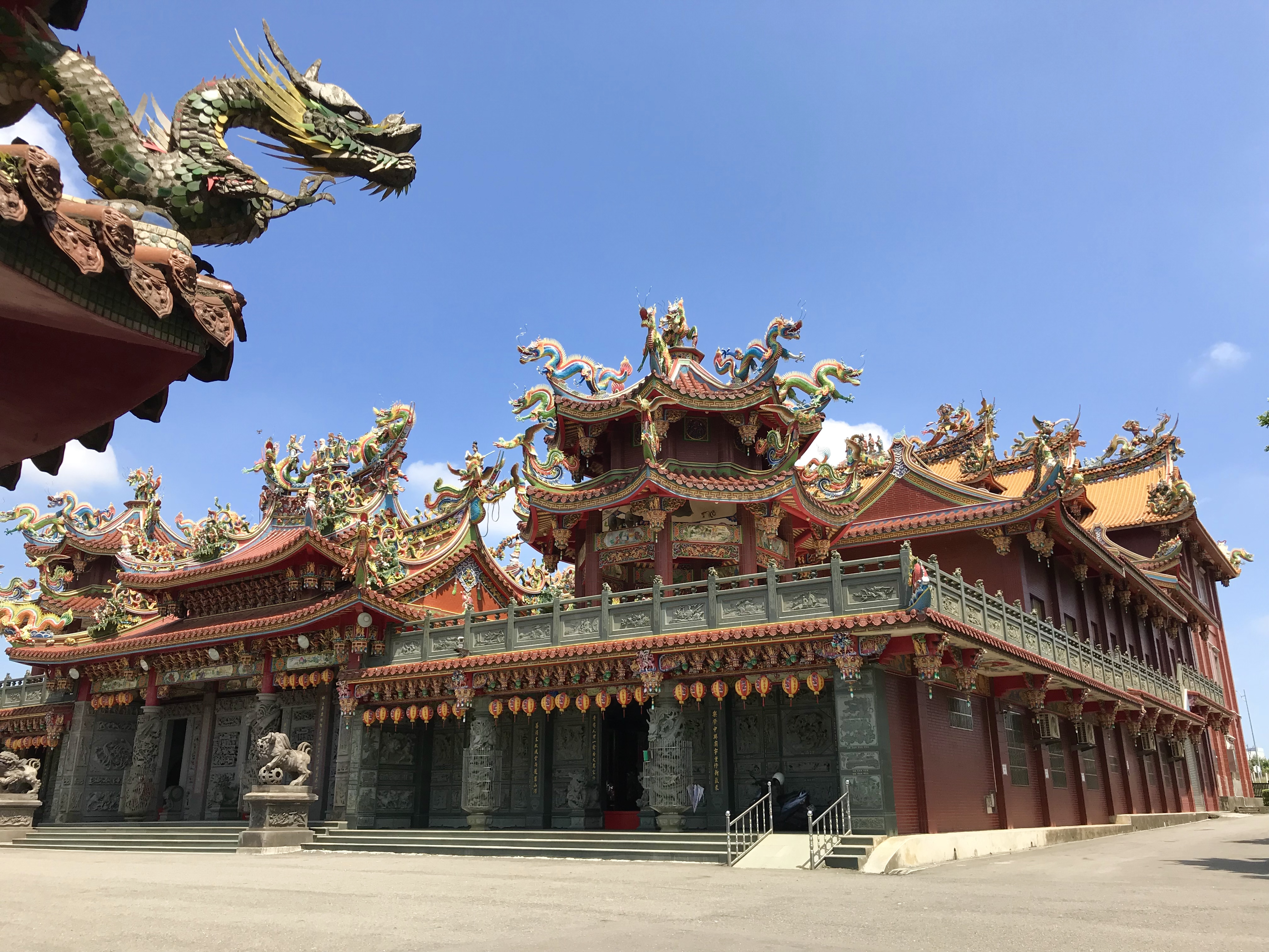 中文（台灣）: 樂善寺斜照